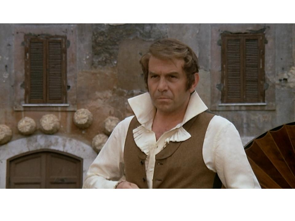 fotogramma dal film "Nell'anno del Signore" 1970